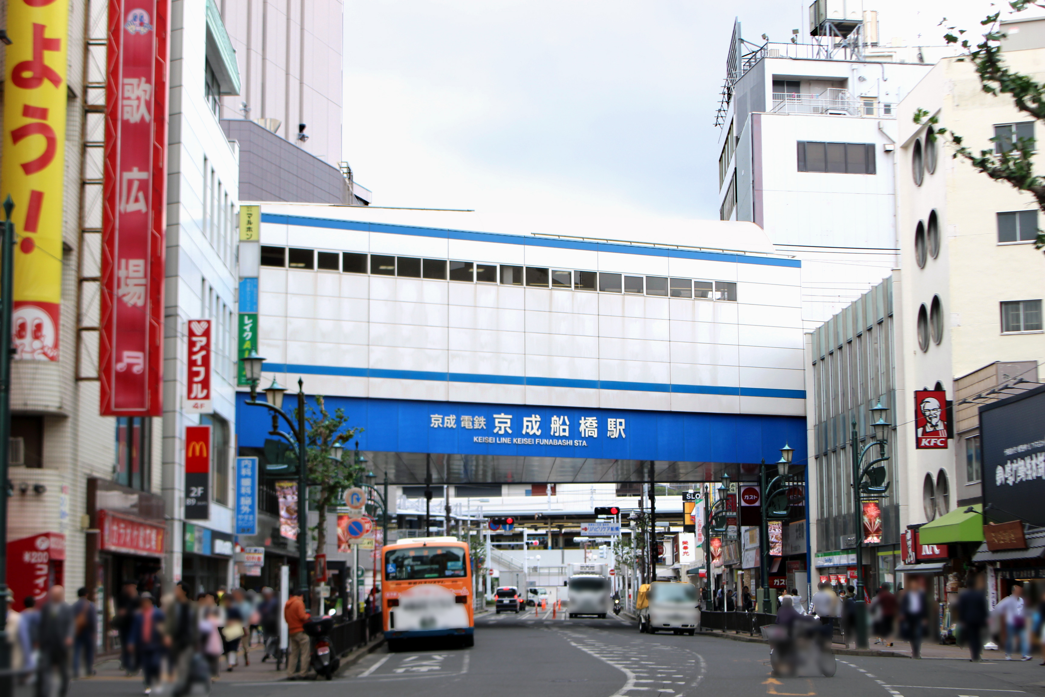 京成船橋駅 駅舎南側